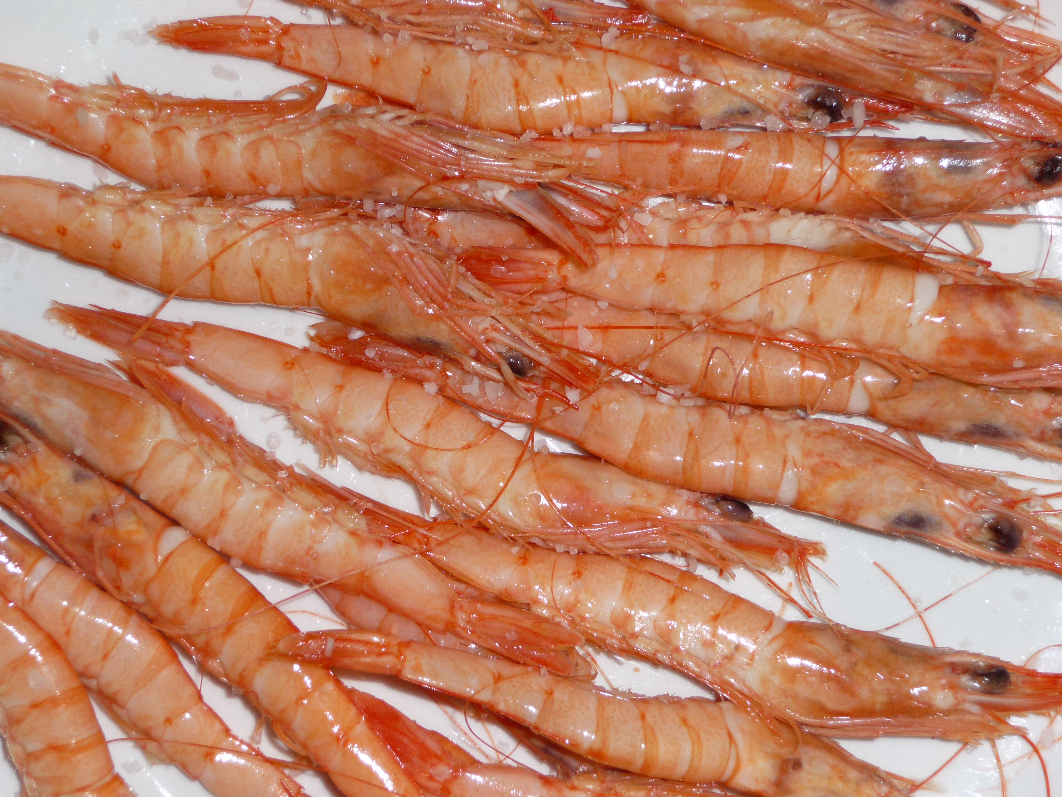 Gamba blanca de Huelva.